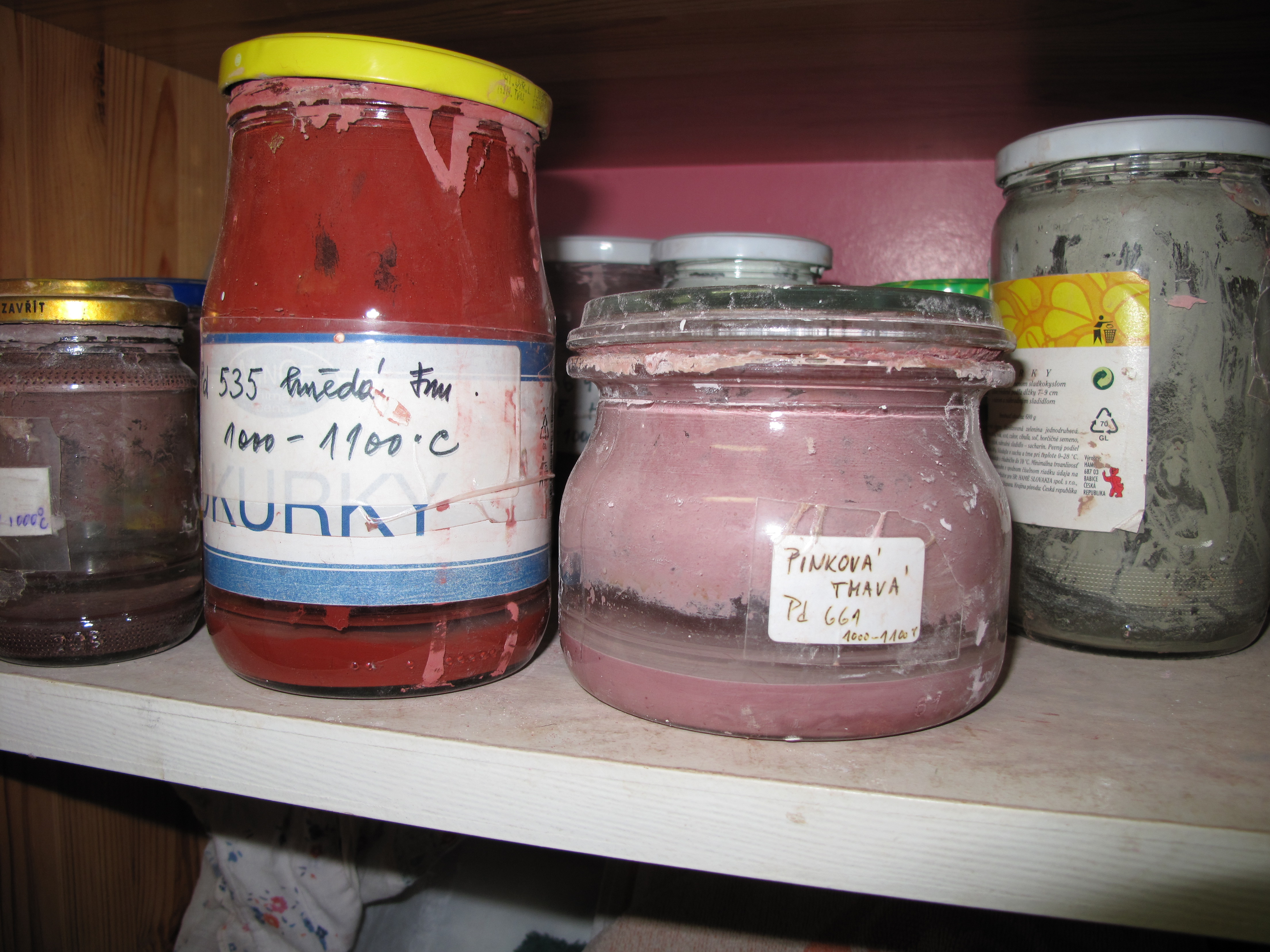 Zásobárna glazur. Ateliér Hruška, Praha Smíchov.